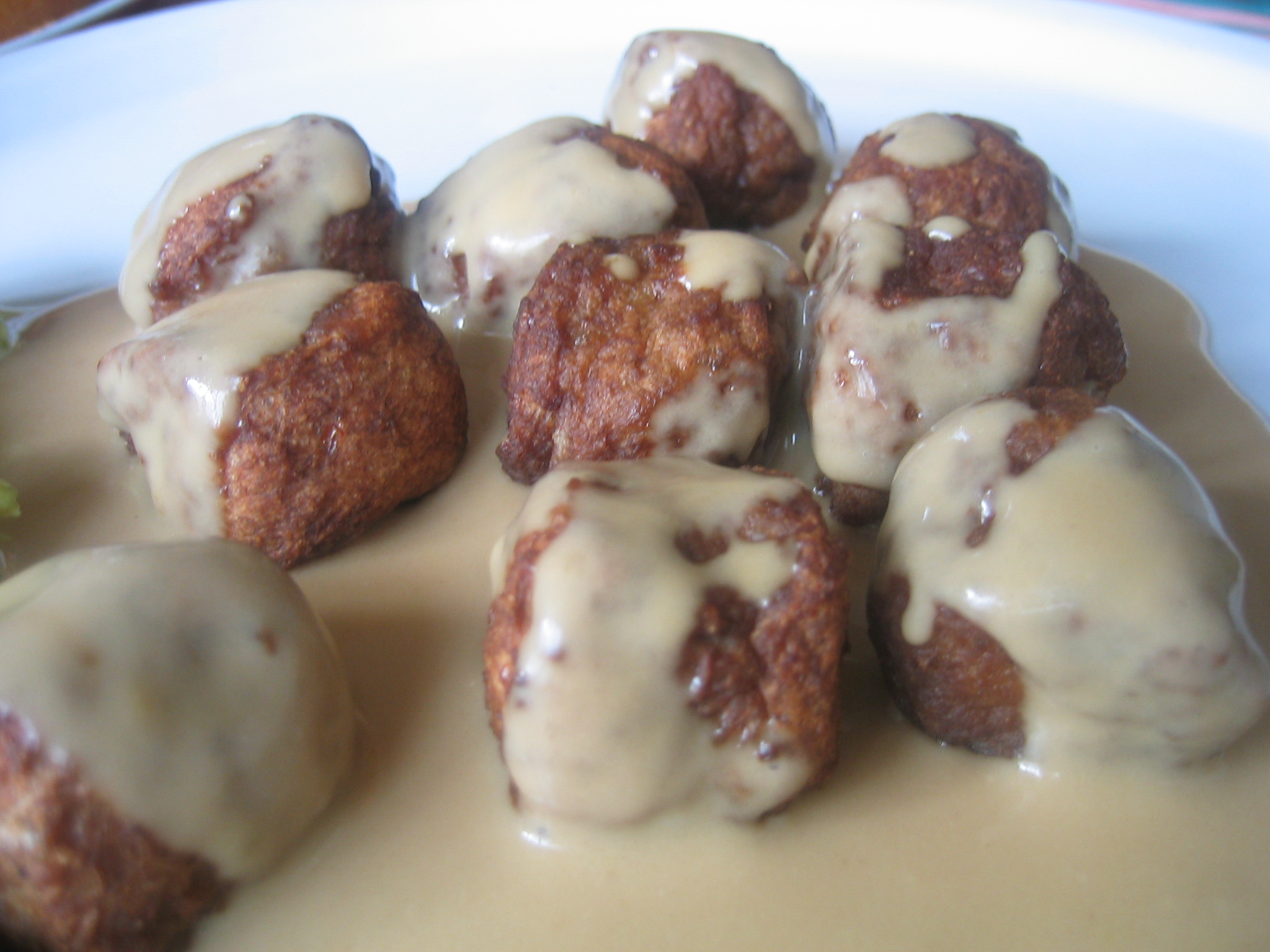 Köttbullar